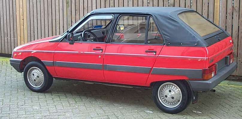 Citroen Visa Décapotable 1985